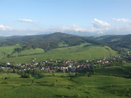 Panorama centrum Łapsz Wyżnych